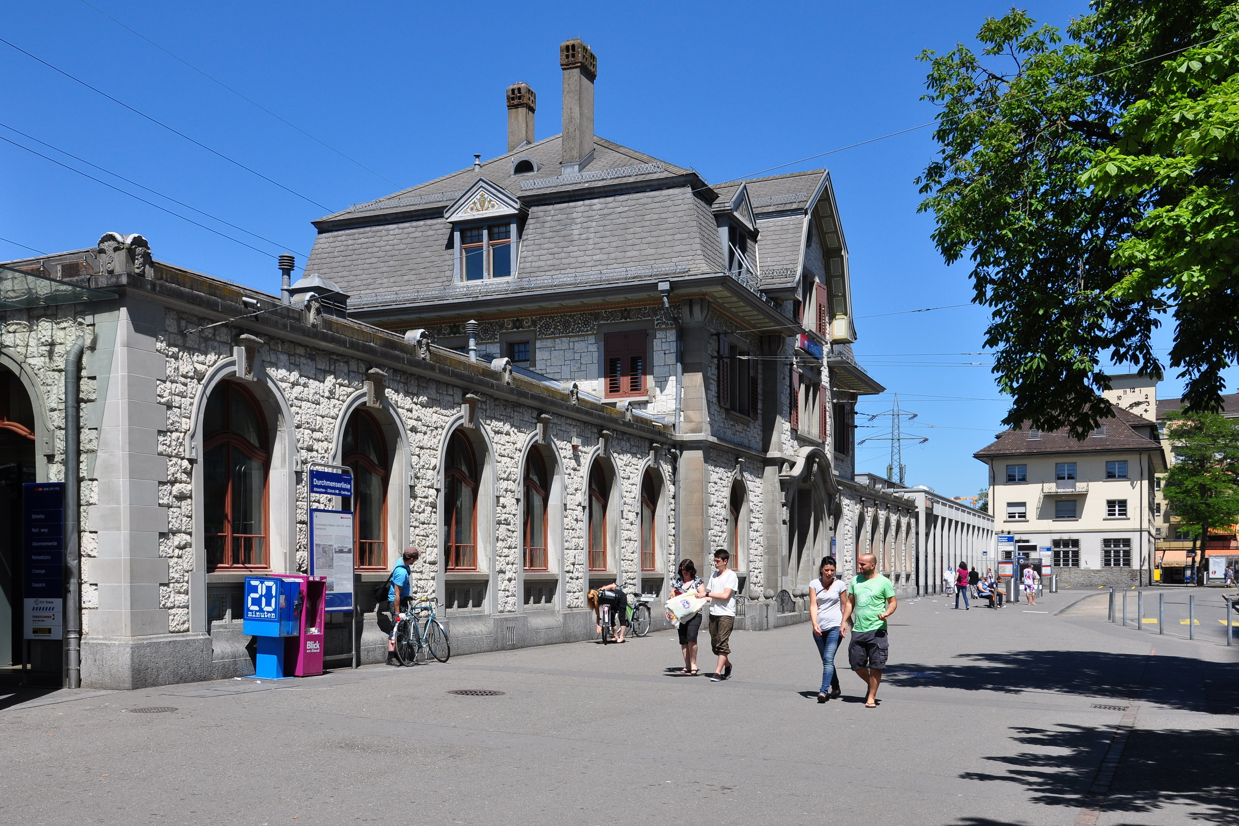 Zürich-Oerlikon train station (Switzerland)